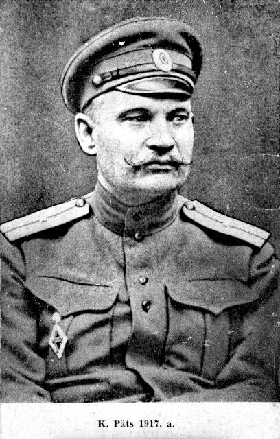 Muuseumikogu Fotokogu Olemus foto Säilivus määramata legend 1917 Fotograaf teadmata Repro Jüri Karm kommentaar Fk 2625:1 - 109 Fotod Eesti Vabariigi (1918 - 1940) Kaitseväe, Kaitseliidu, Naiskodukaitse ja Noorkotkaste liikmeskonnast, valdavalt portreefotod. Fotod saadi ümberpildistuseks Eesti Kaitseliidu Muuseumi juhatajalt Olavi Pungalt, kes abistas ka fotode legendeerimisel Andis üle ERMi arhivaar Jana Reidla. v.v. akt ?